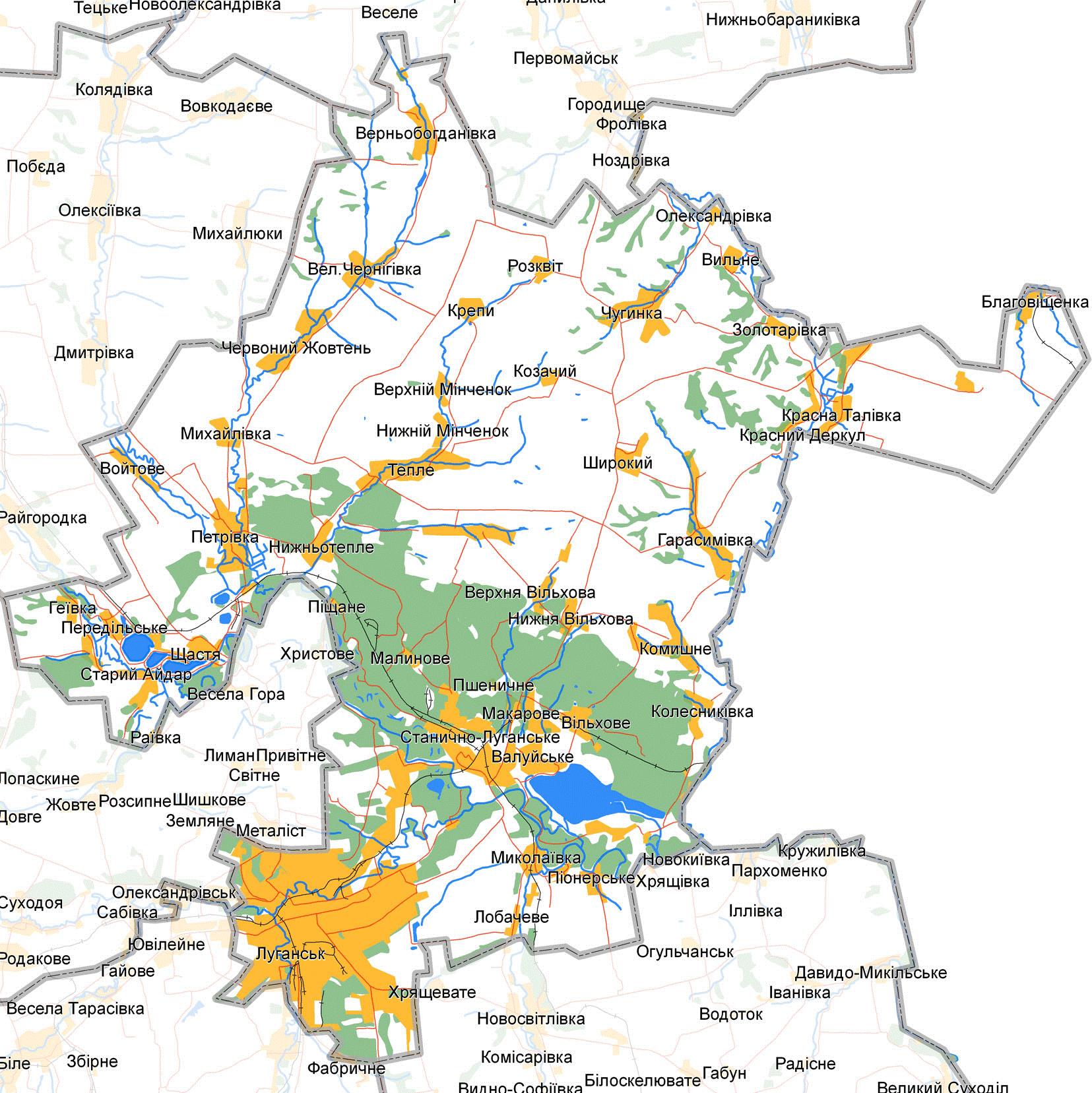 Мапа Станично-Луганського району: Мапа Станично-Луганського району